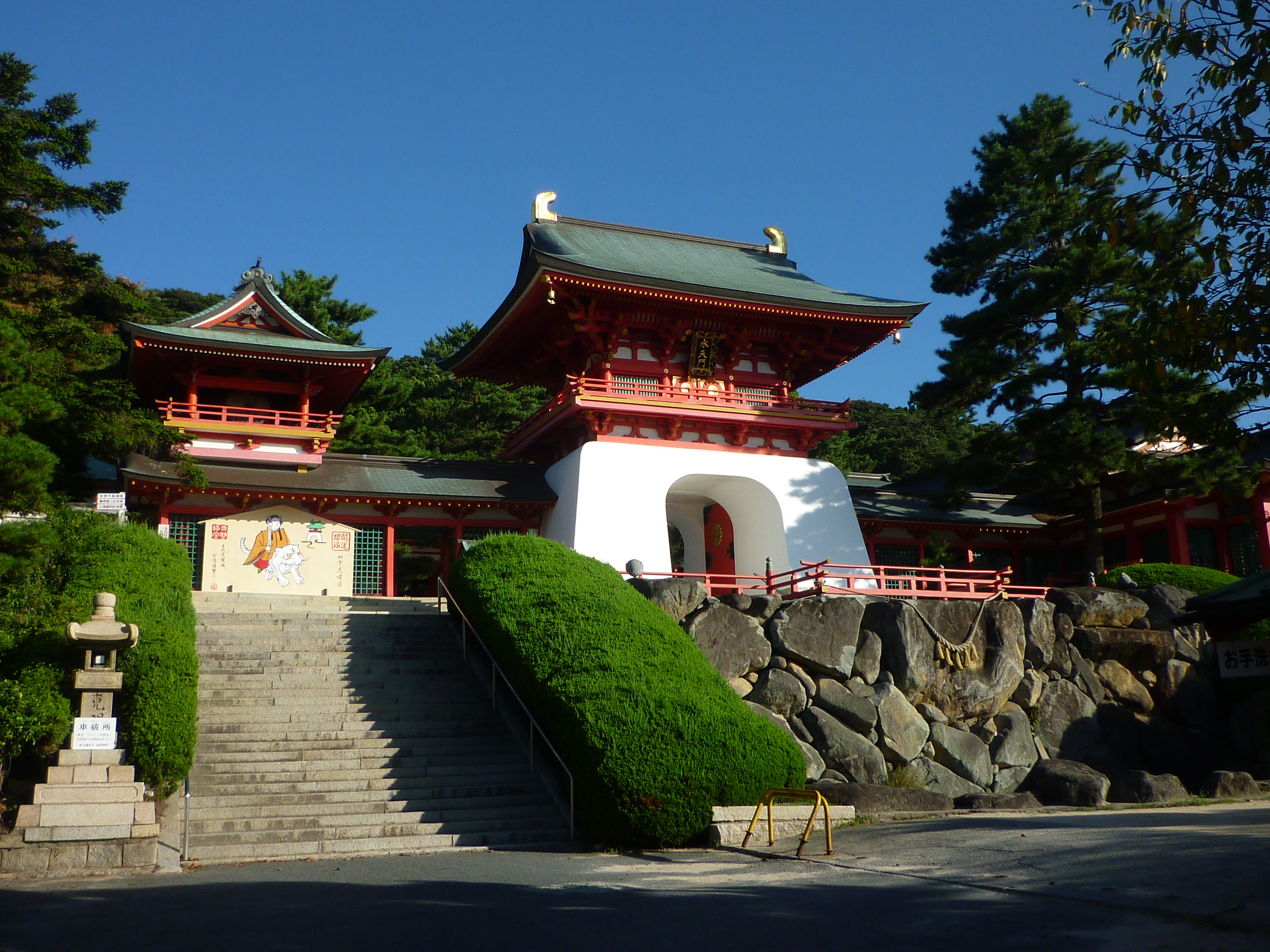 朝陽のなかの赤間神宮